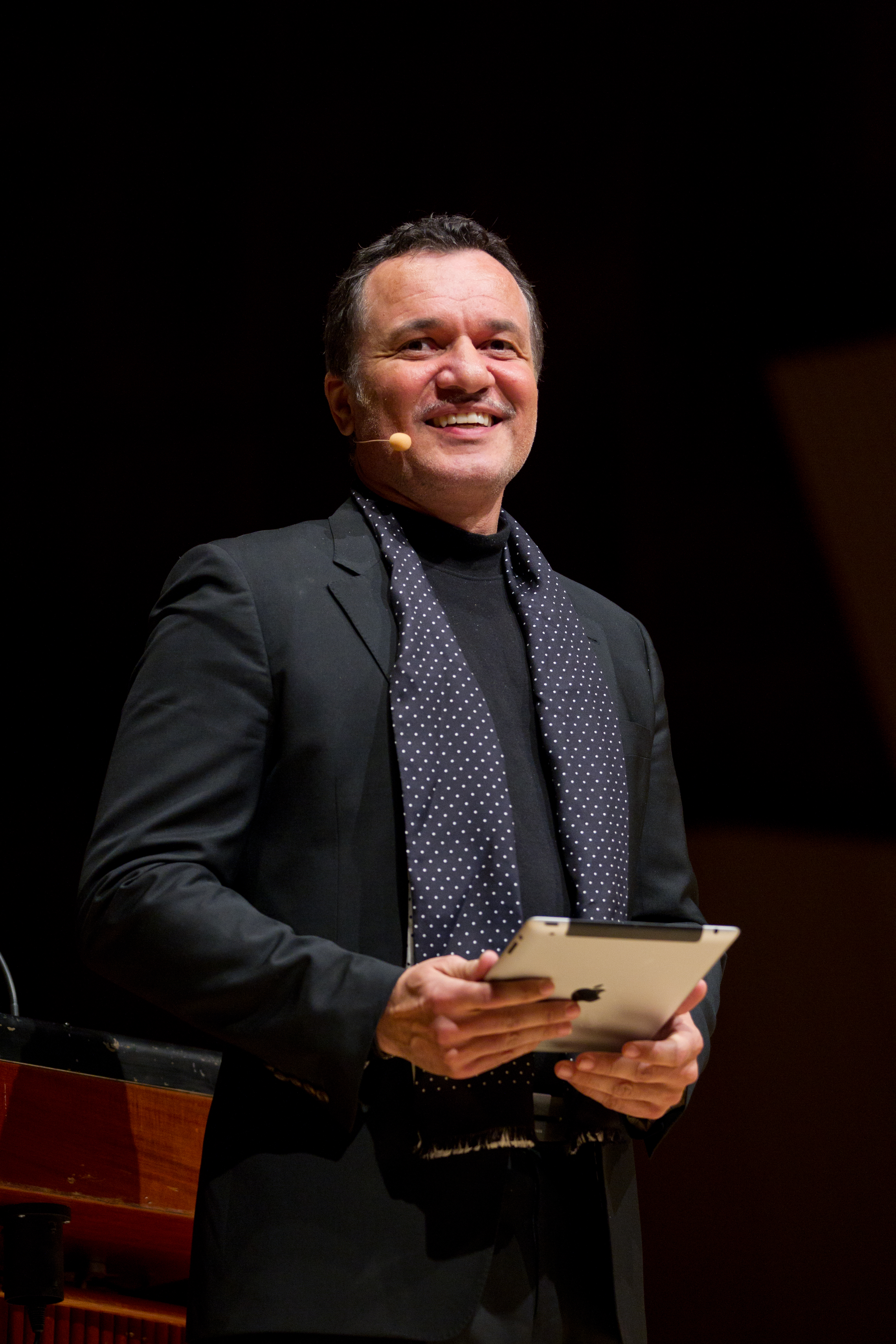 Michael Carøe var konferencier vid prisutdelningen av Nordiska Rådets pris vid Nordiska Rådets session 2011 i Köpenhamn.